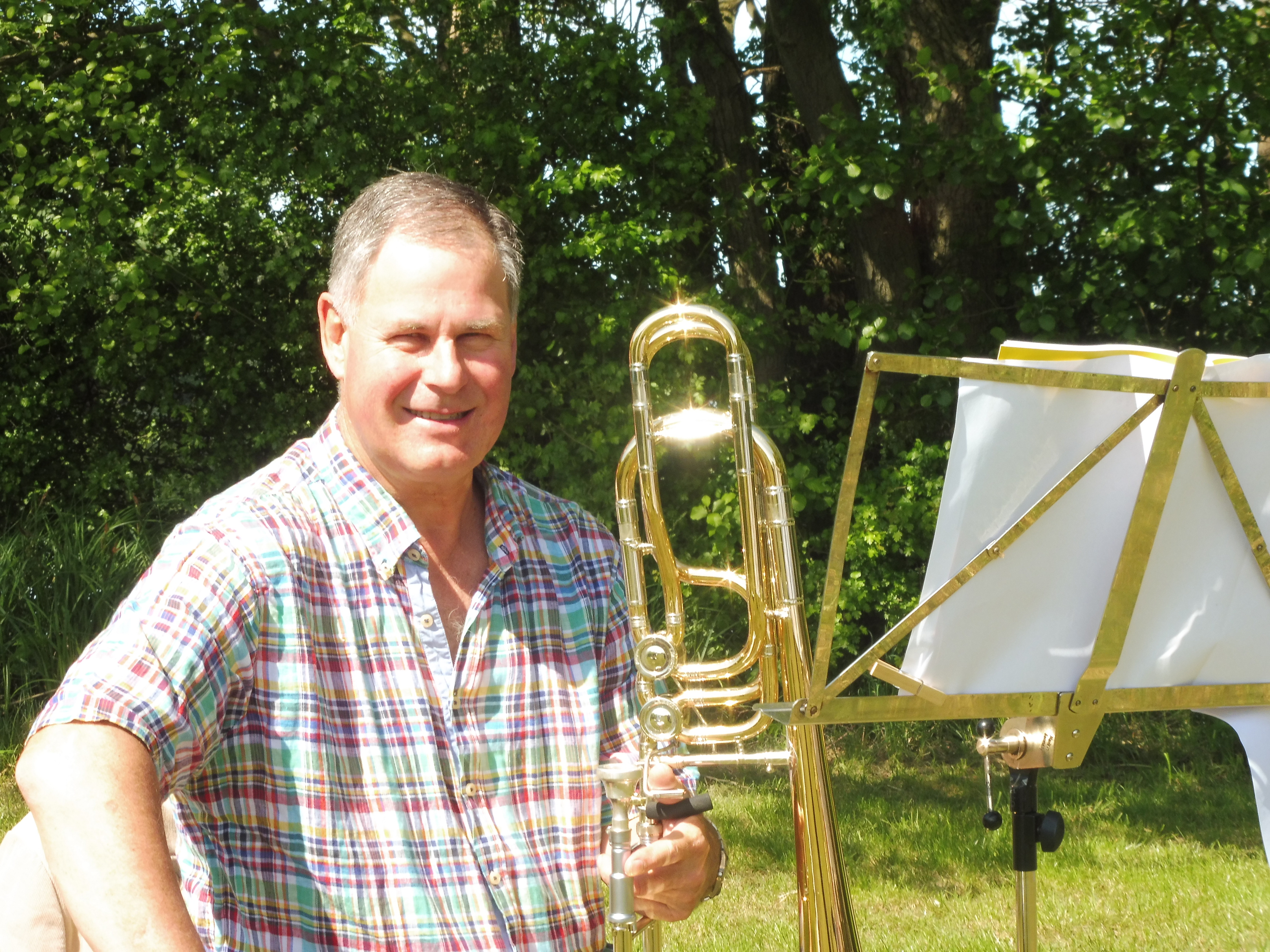 Martin Huss beim Gottesdienst an Christi Himmelfahrt in Ausbau Barkow